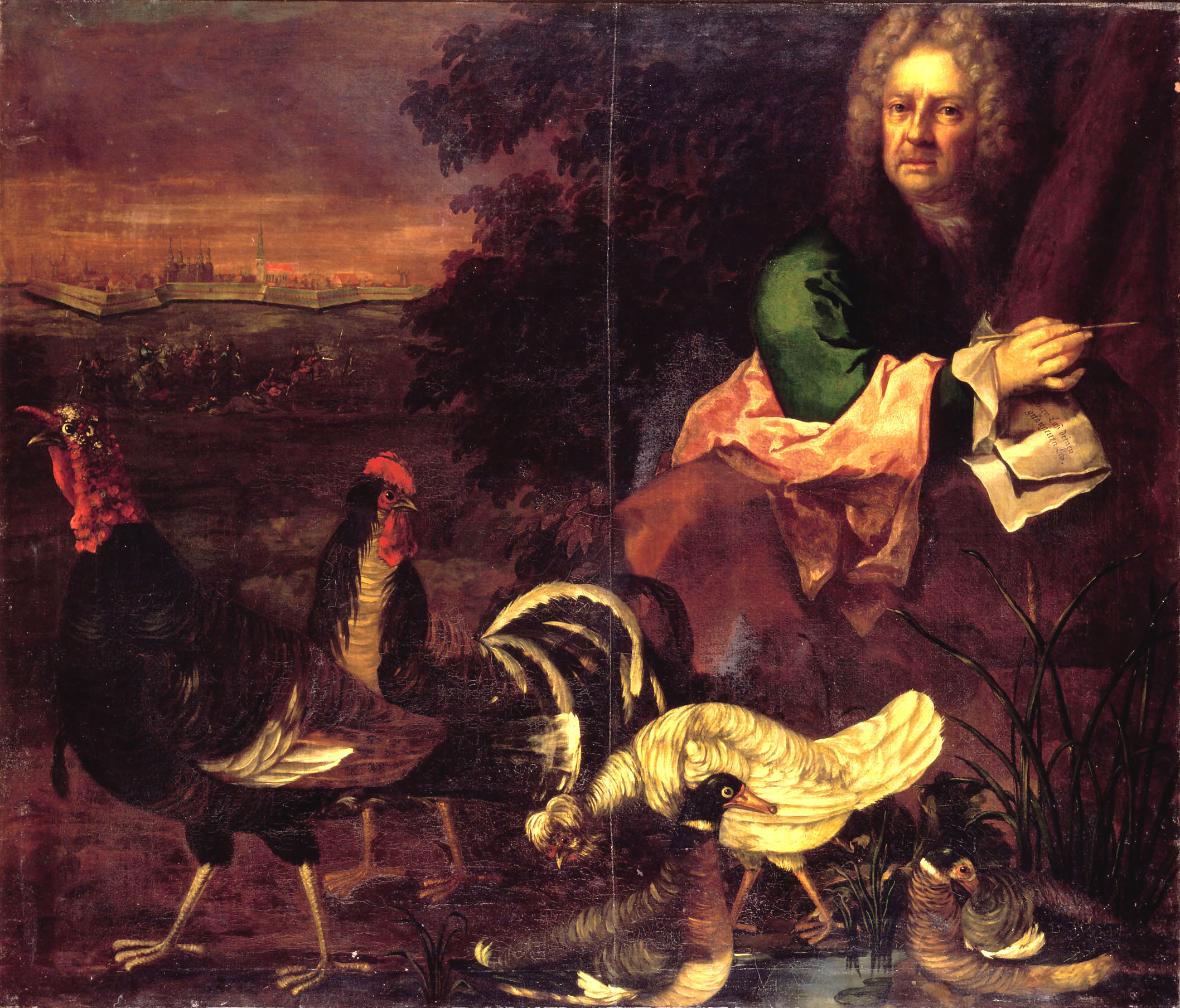 Detta självporträtt målade Magnus Stenbock under sin fångenskap i Danmark, utförd i sommaren eller hösten 1713. I bakgrunden syns den holsteinska fästningsstaden Tönningen, där hans armé hade kapitulerat i maj samma år. Porträttet var en gåva till den danske kungen. På papperet som Stenbock håller anas orden: »Herre, släpp din fånge fri.» Självporträttet hänger idag på Rosenborgs slottsmuseum i Köpenhamn.